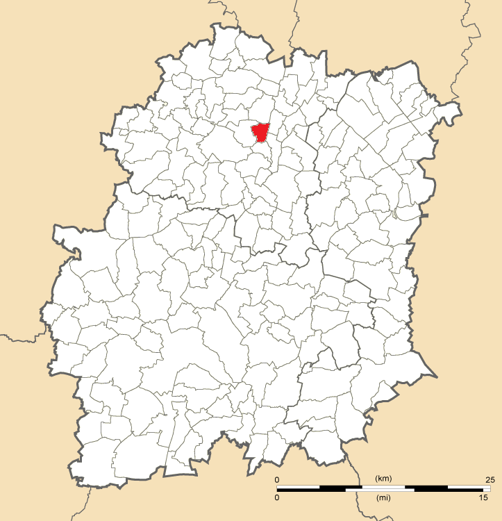 Carte de position de La Ville-du-Bois en Essonne (91)